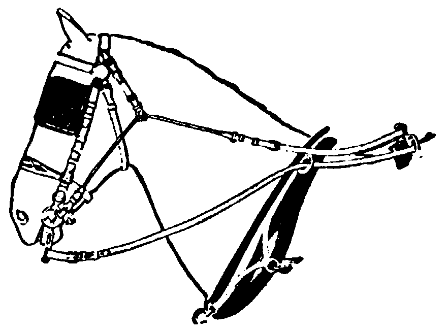 Körbetsel med skygglappar och stuptygel.